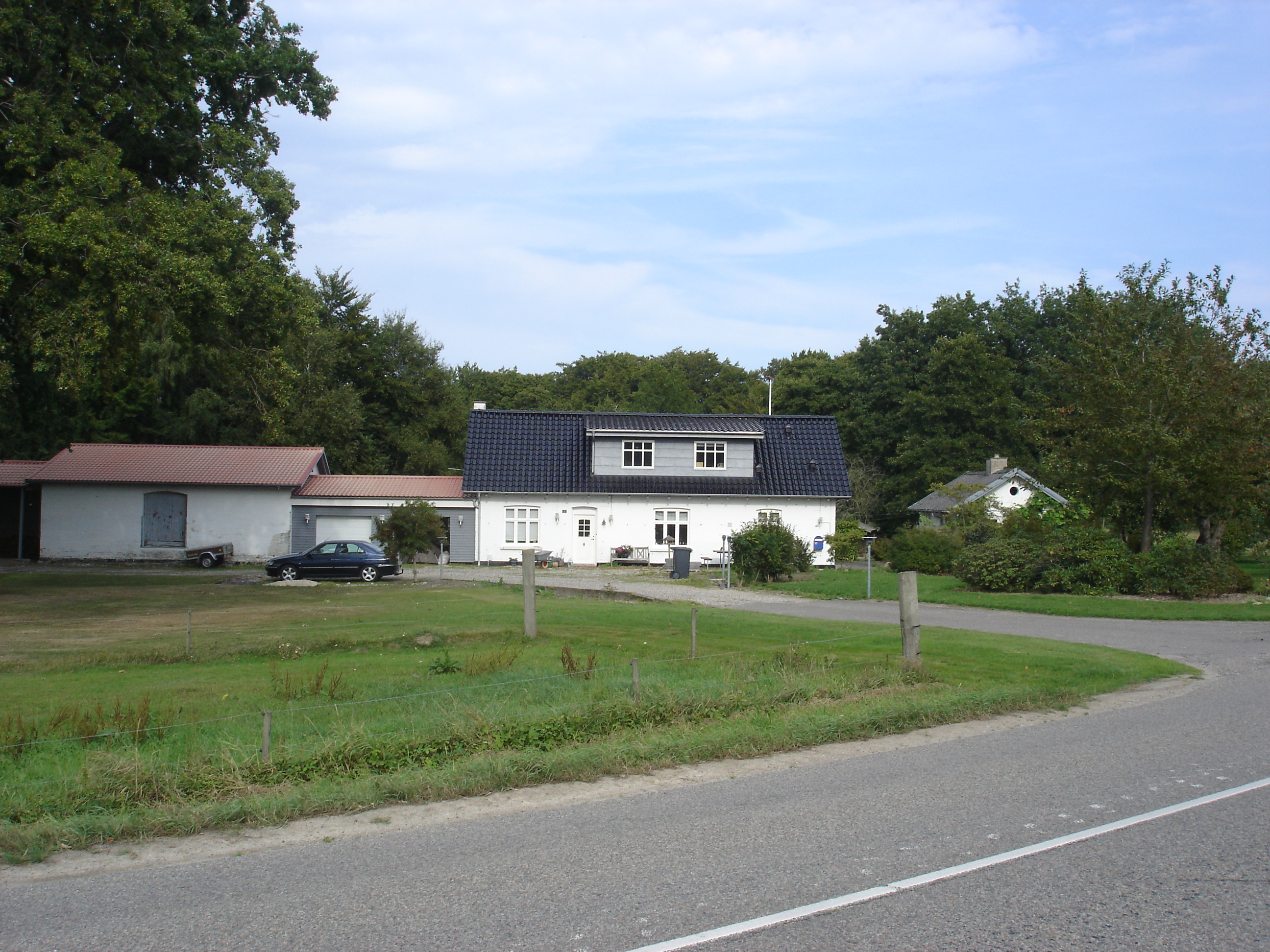 Solbjerg Station fra vejsiden